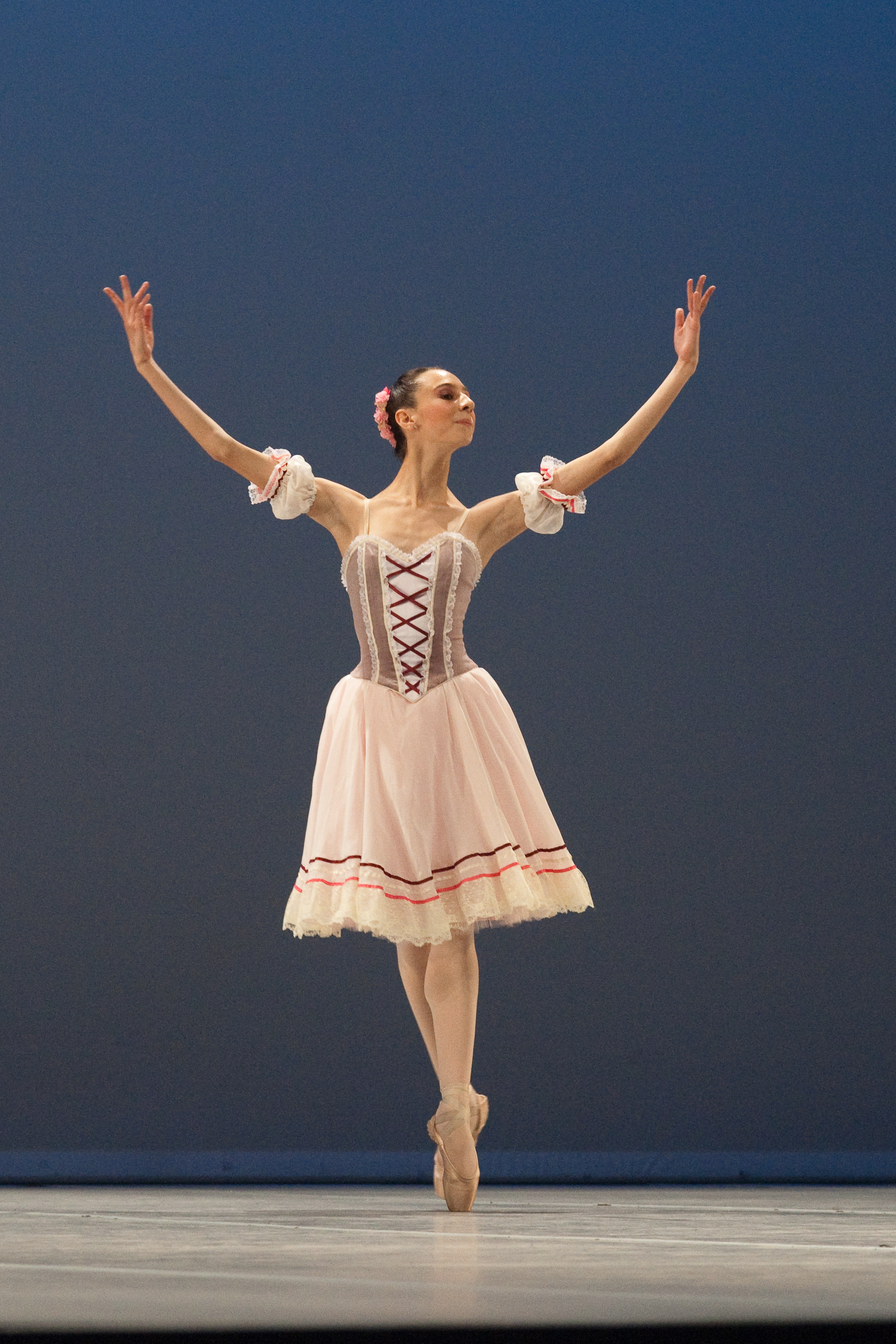 Variation extraite de Coppélia au Prix de Lausanne 2010.